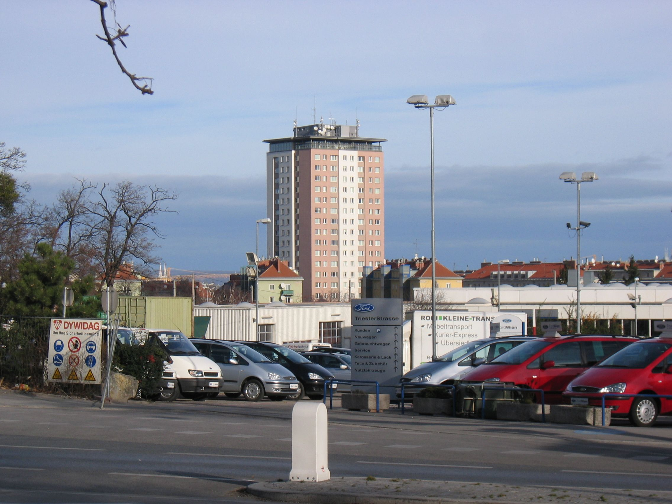 Matzleinsdorfer Hochhaus vom Süden betrachtet